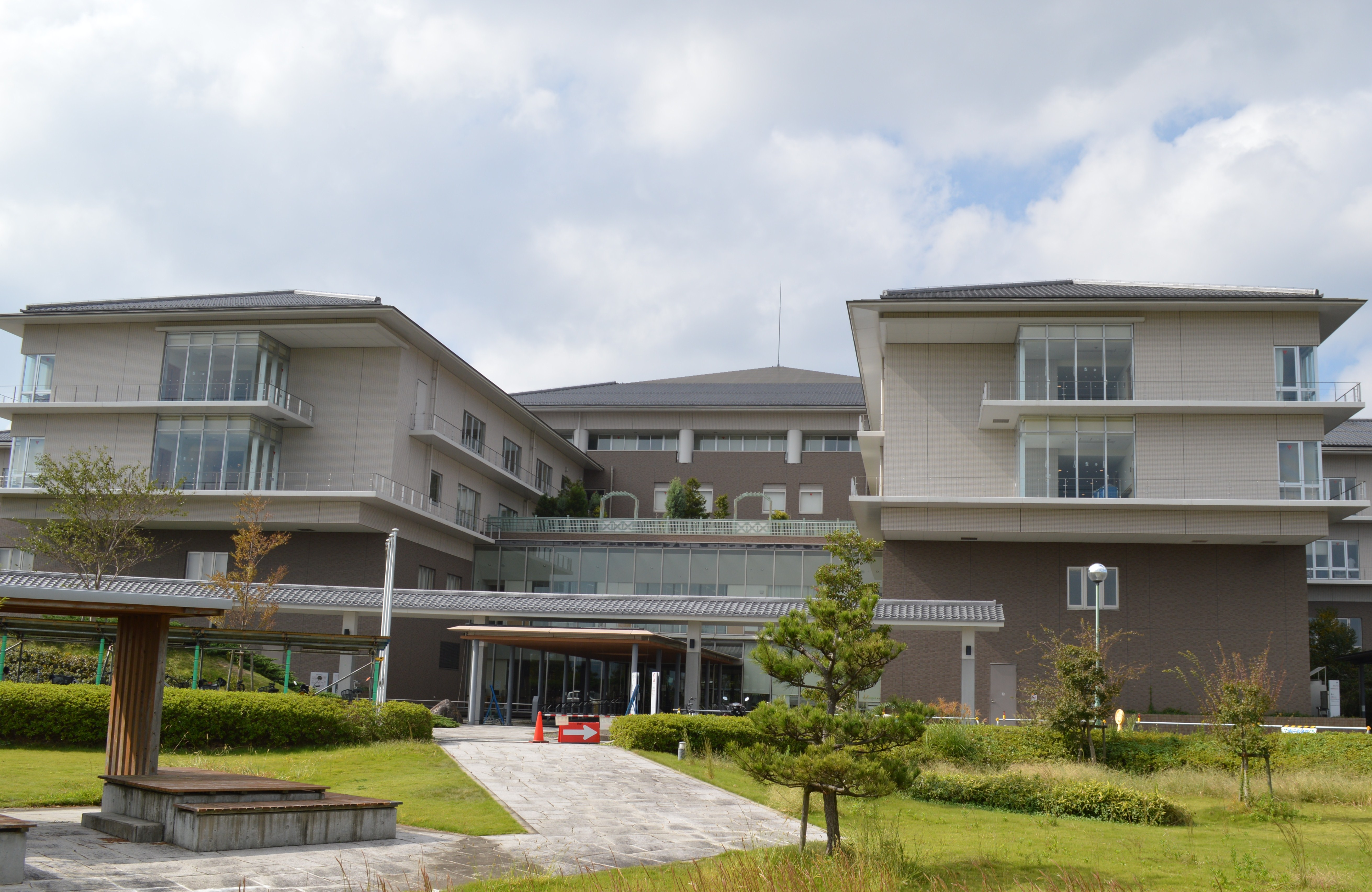 滋賀県の近江八幡市立総合医療センター